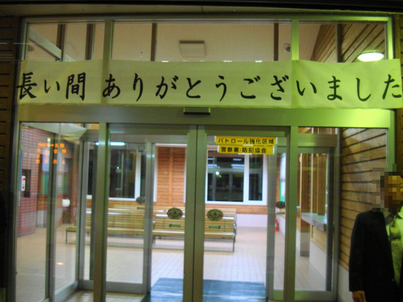 Saroma Bus Terminal